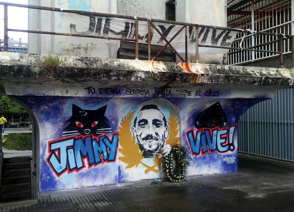 Homenaxe a Jimmy, Riazor Blues A Coruña